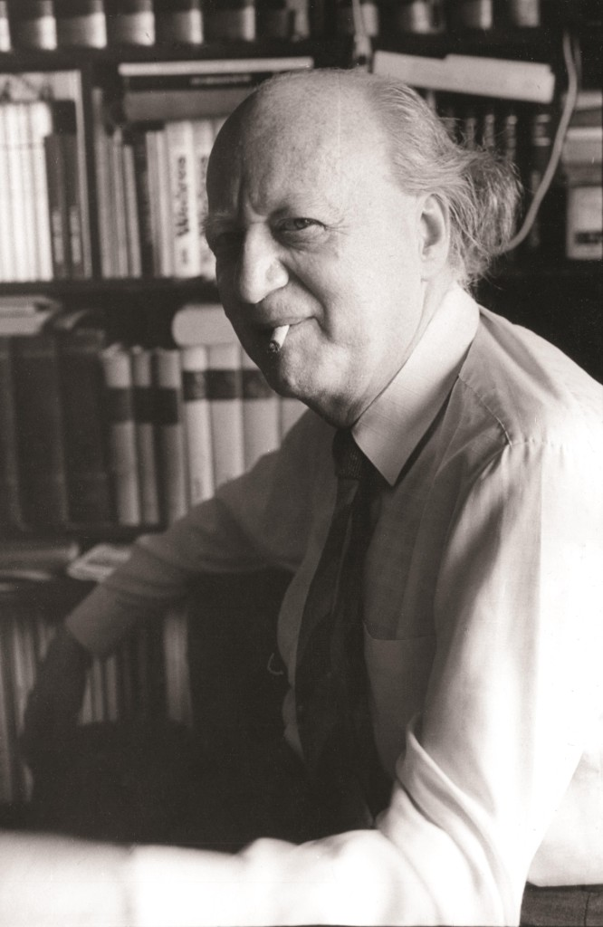 Réz Pál magyar irodalomtörténész, műfordító, szerkesztő, műkritikus